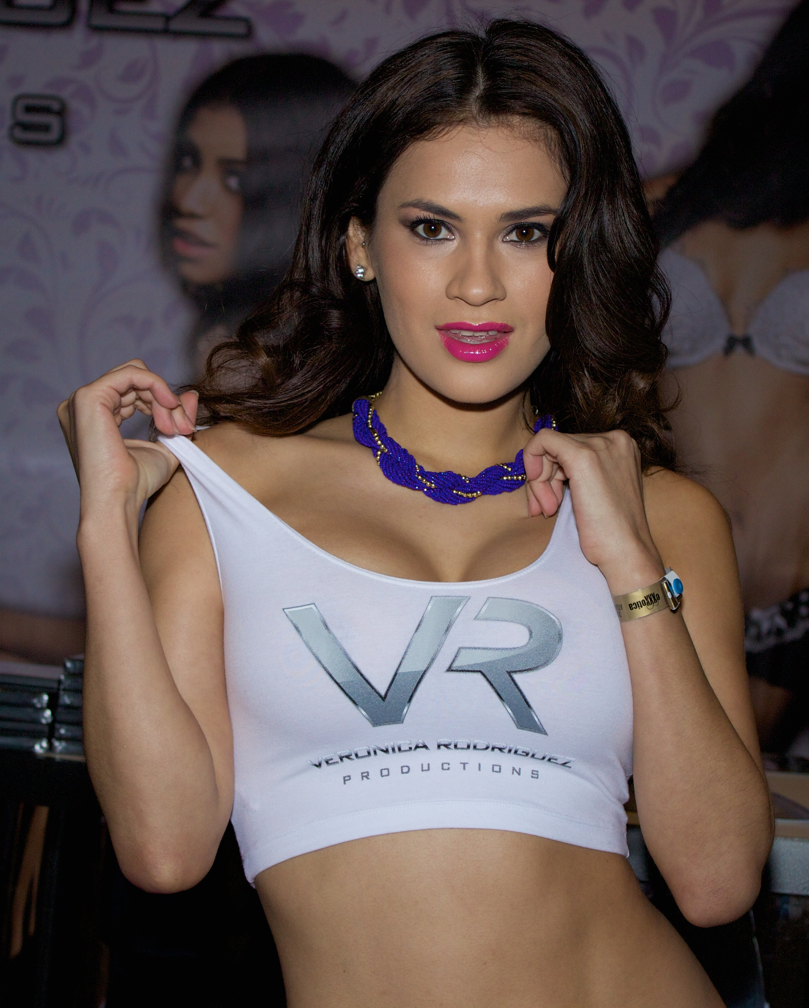 Vanessa Veracruz